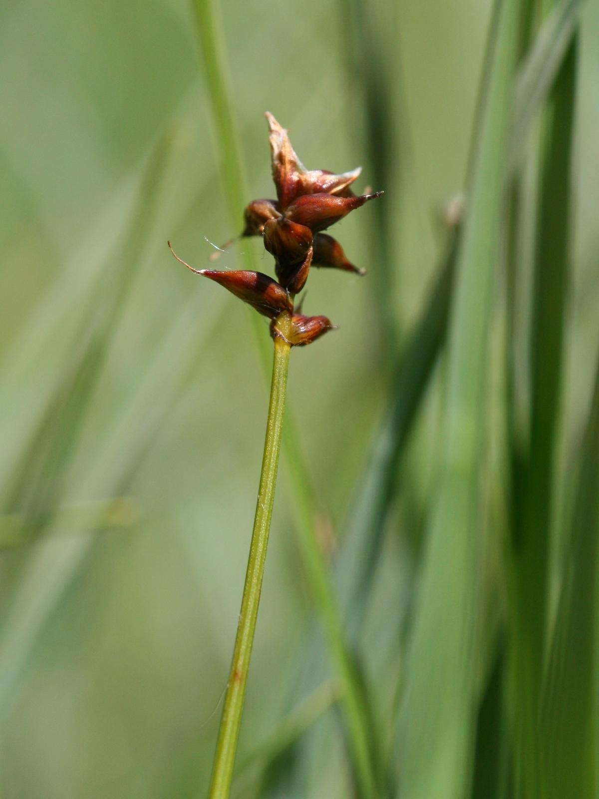 Zweihäusige Segge (Carex dioica), weibliche Pflanze